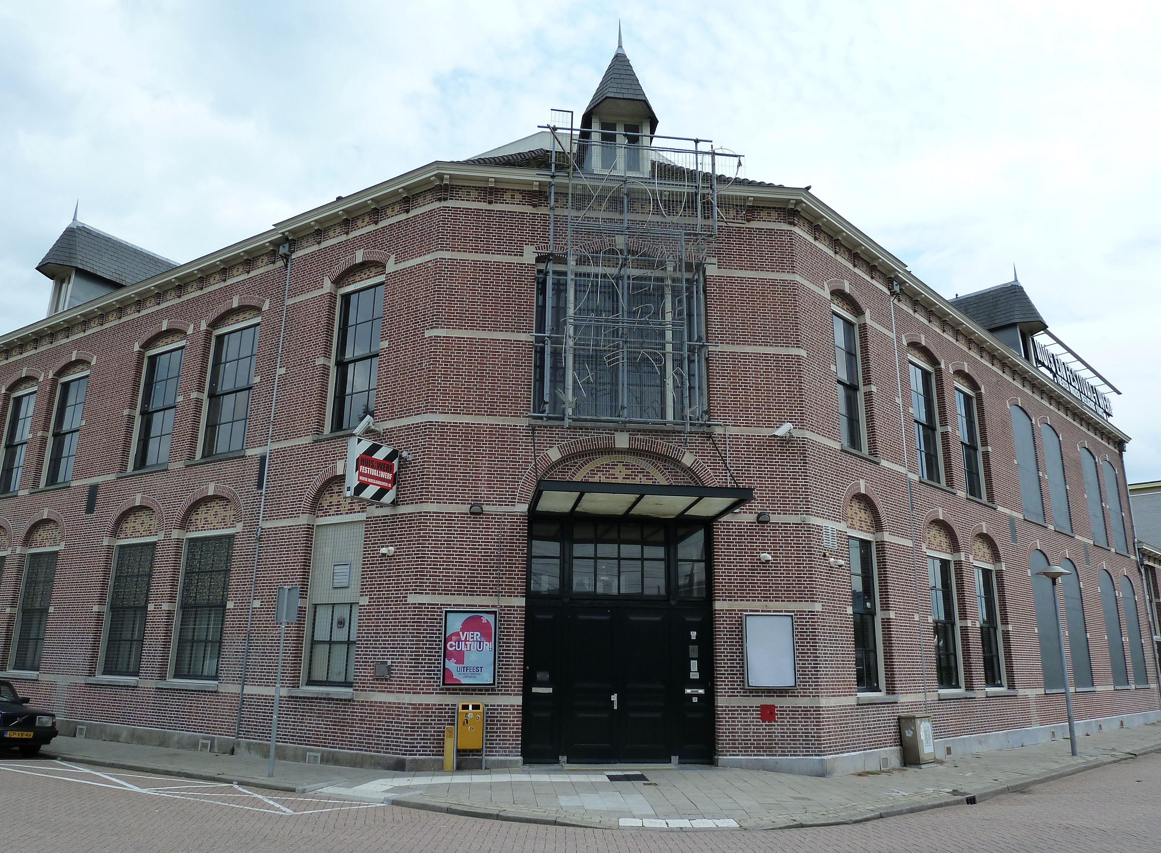 Het Huis Utrecht ( Spijkerstraat/Boorstraat 107, Utrecht, NL.